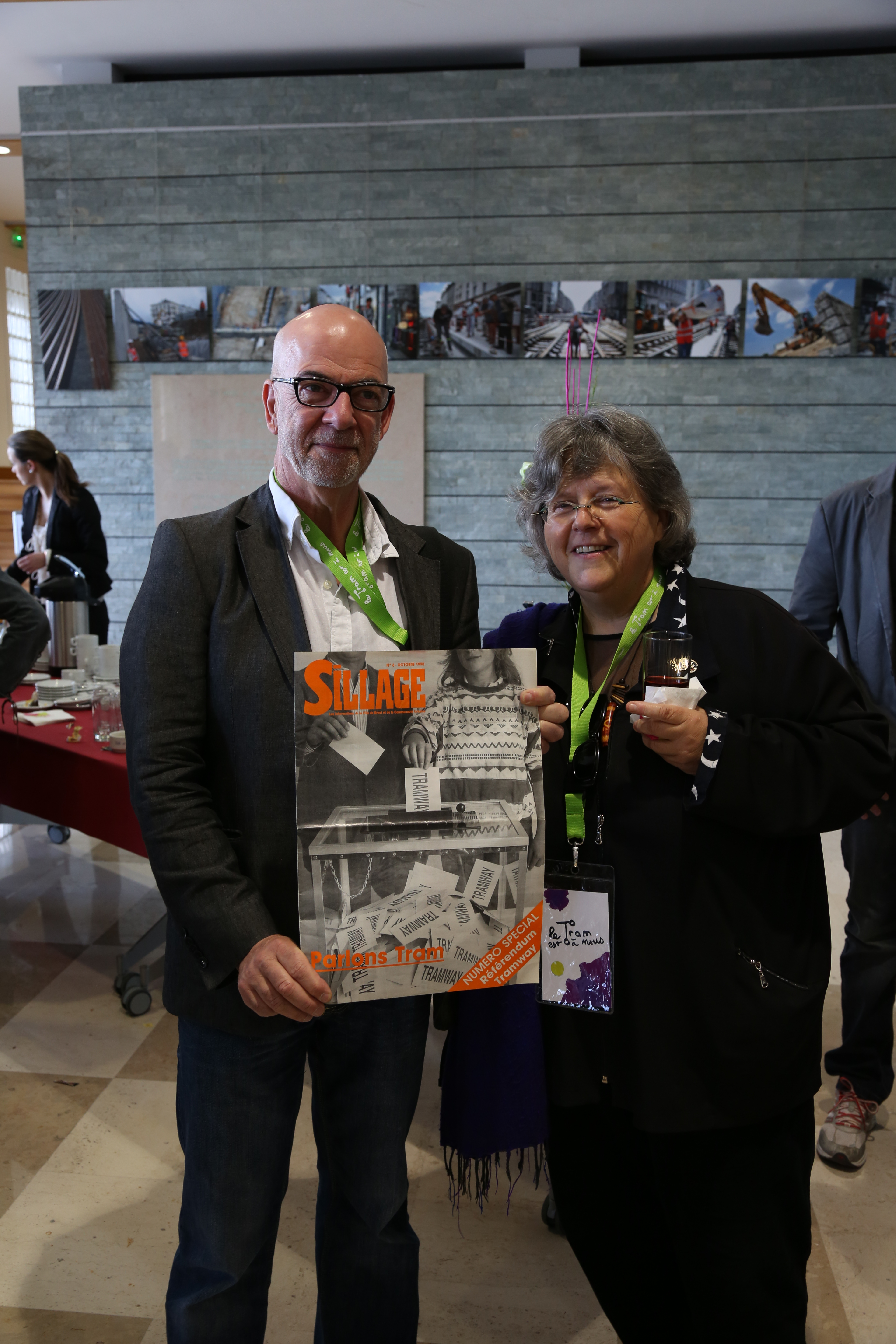 Photos autour de l'inauguration du Tramway à Brest le 23 juin 2012 journal de la ville sur le référendum sur le projet de Tramway en 1990 (résulat négatif à 80% à l'époque)